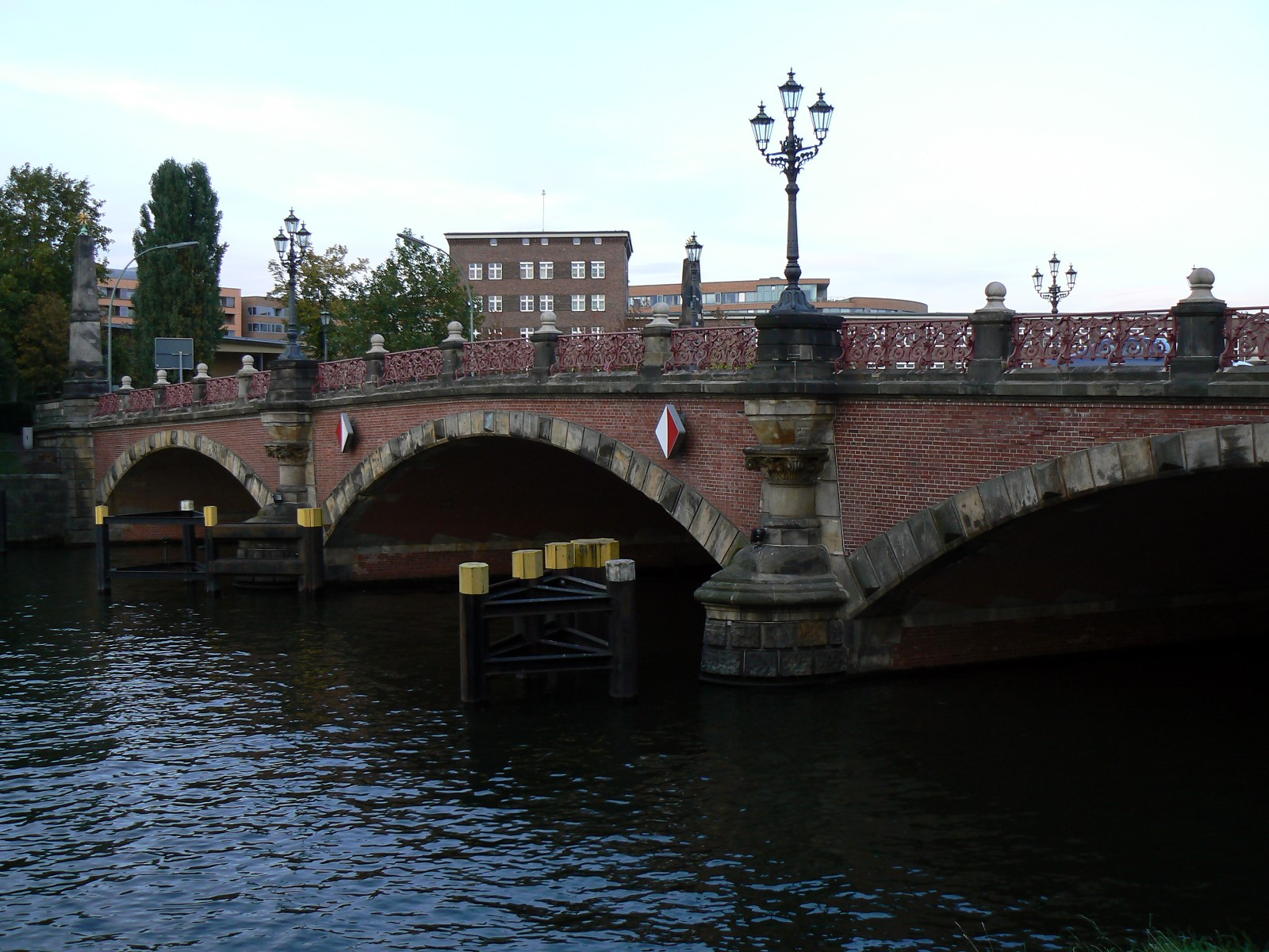 Lutherbrücke in Berlin am Schloss Bellevue. Erbaut: 1891-92 bzw. 1950-51.